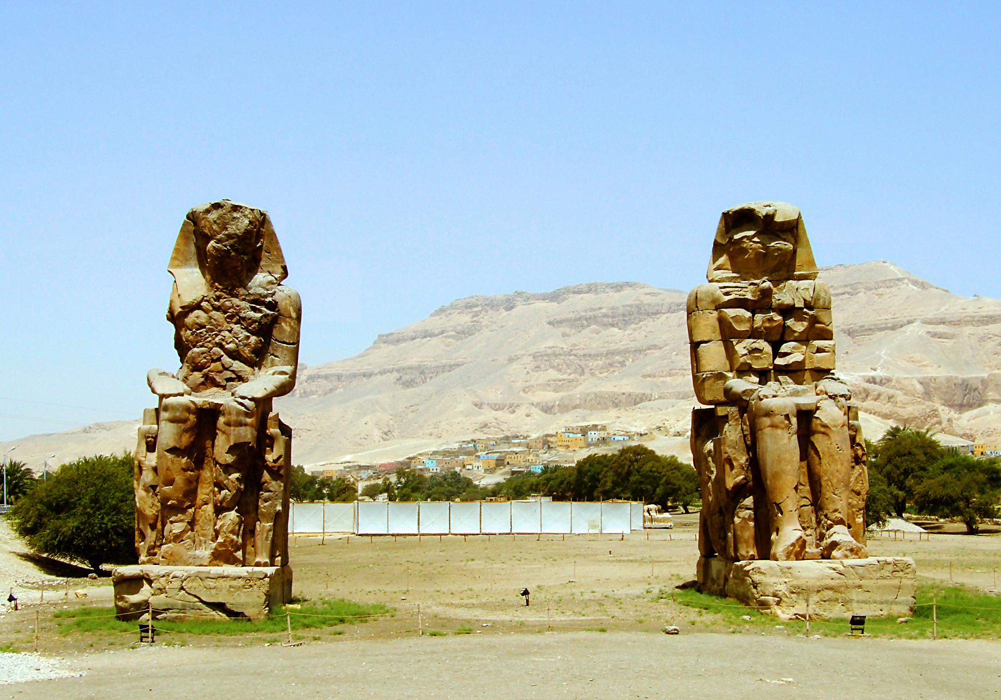 Nekropolia tebańska (Luksor), Zachodni Brzeg; Kolosy Memnona [Theban nekropolis (Luxor), Colossi of Memnon]